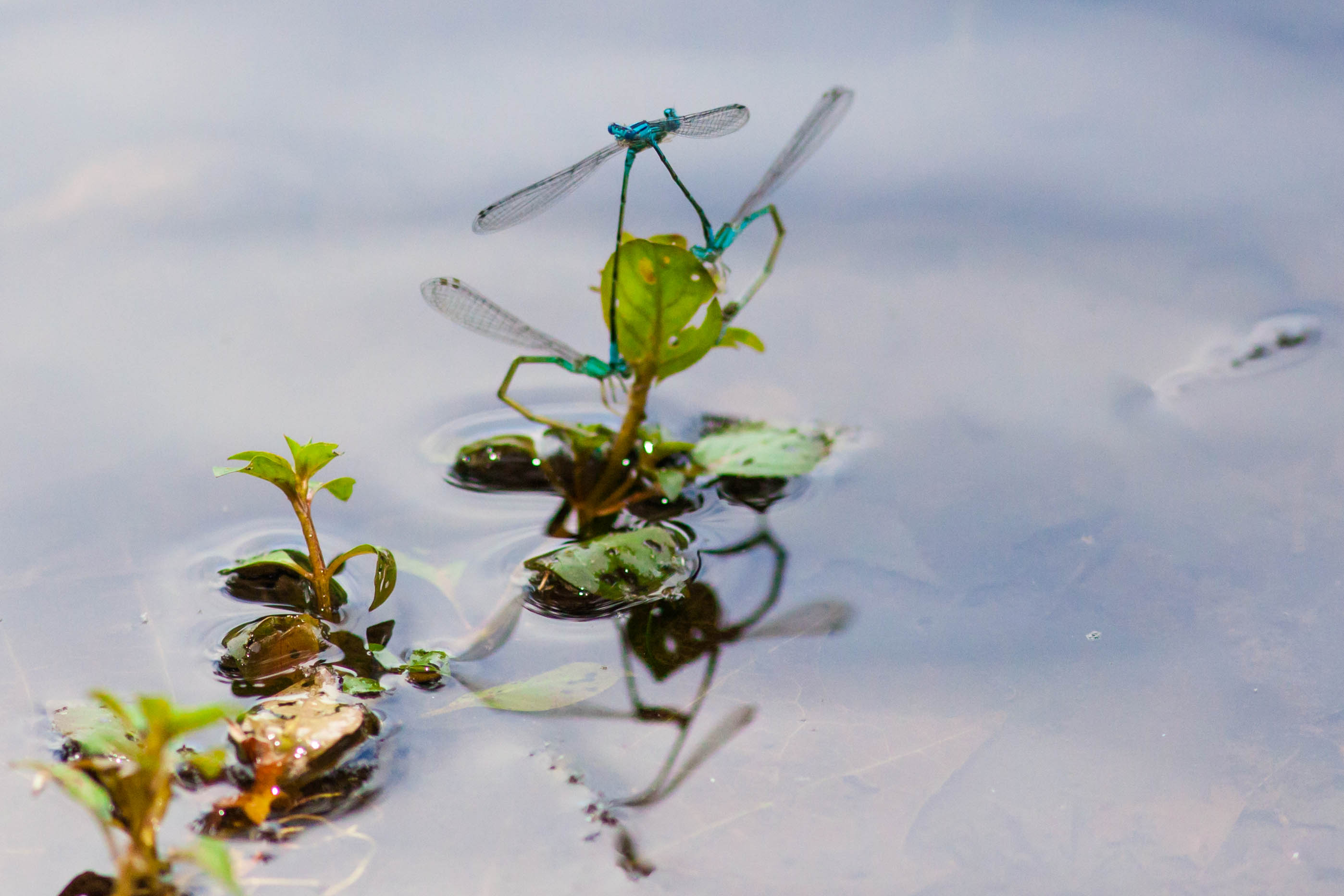 Turquoise bluets